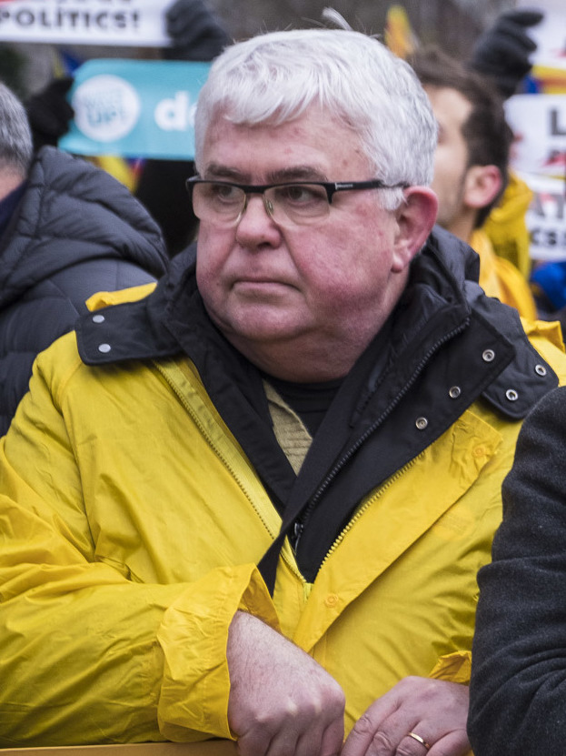 Manifestació per al 7 de desembre de 2017 a Brussel·les per reclamar l'alliberament dels presos catalans per haver defensat la creació de la República Catalana